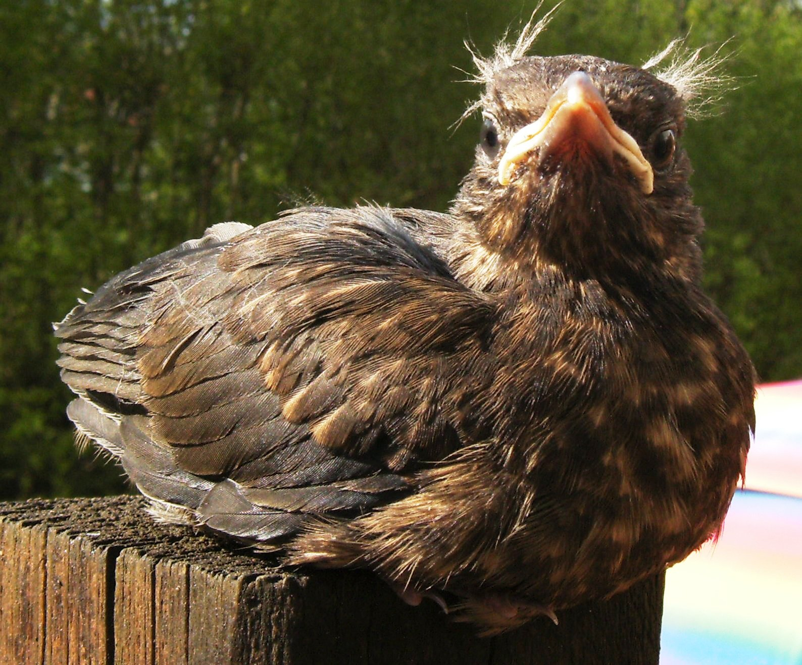 Amsel, weiblich, 12 Tage alt